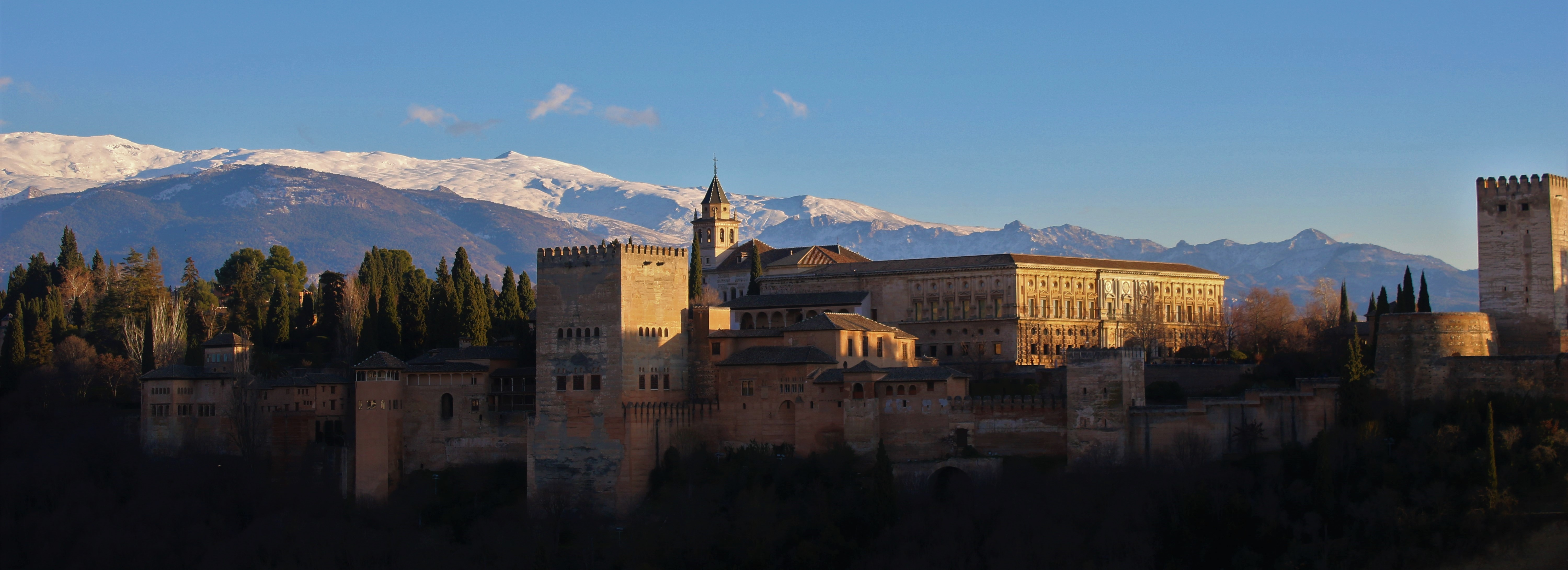 La mejor vista de la Alhambra.